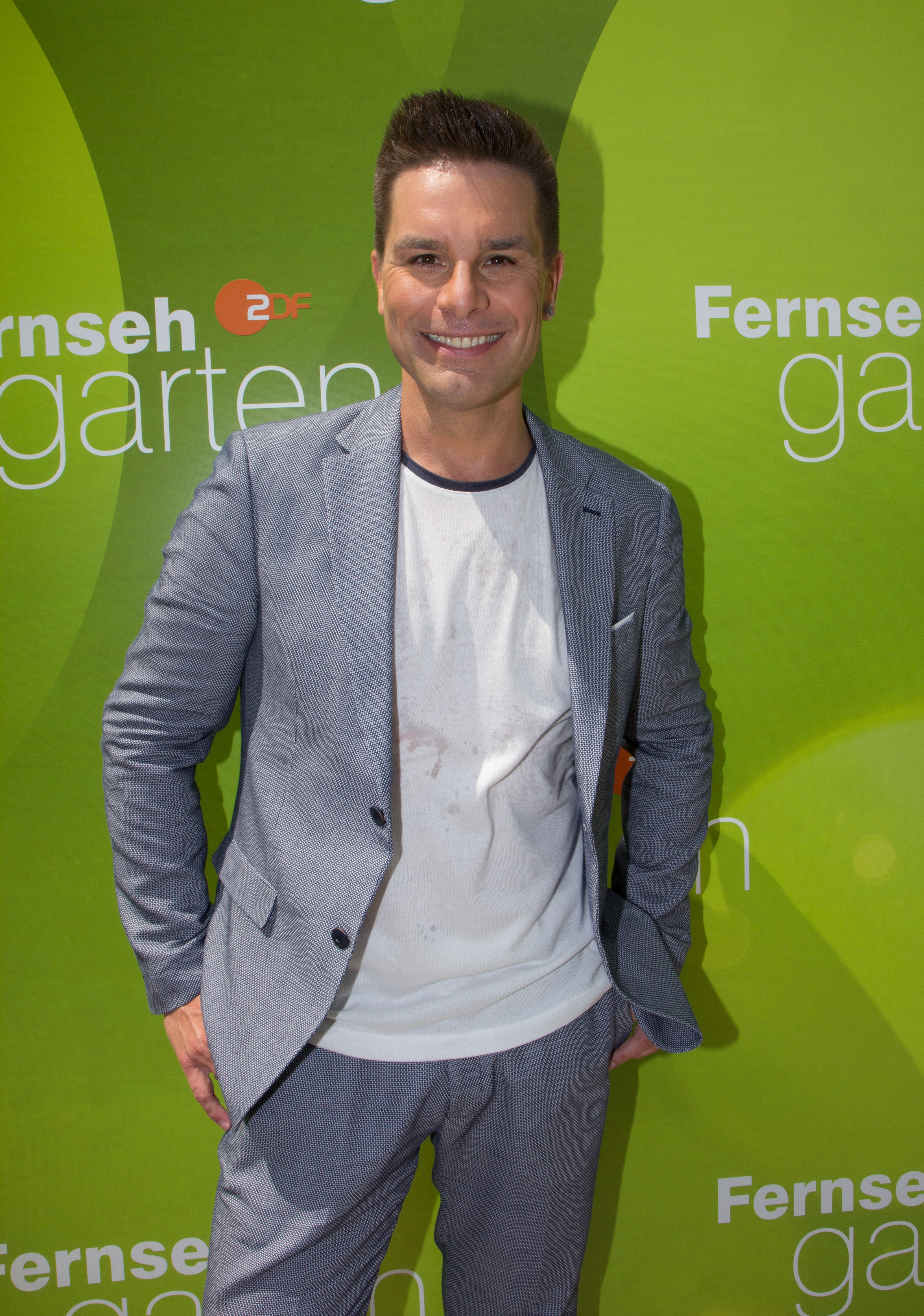 Eloy de Jong als Gast beim ZDF-Fernsehgarten am 10. Juni 2018 in Mainz.